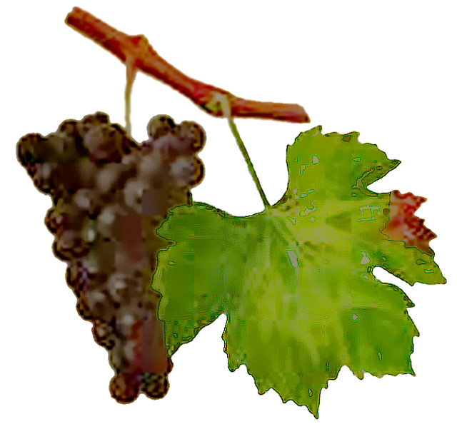 Grappe de Servanin par Viala et Vermorel